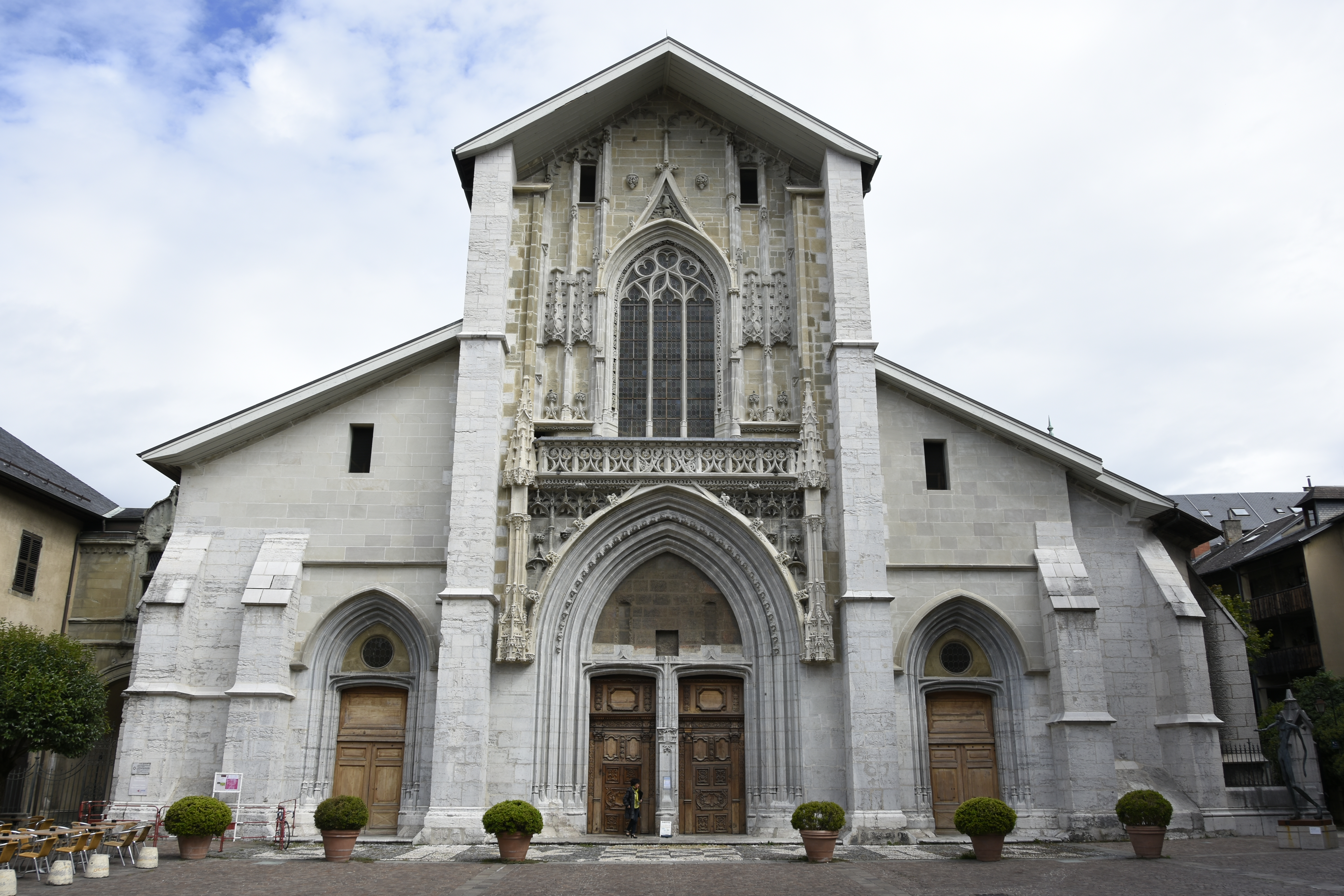 De kathedraal van Chambéry, Frankrijk